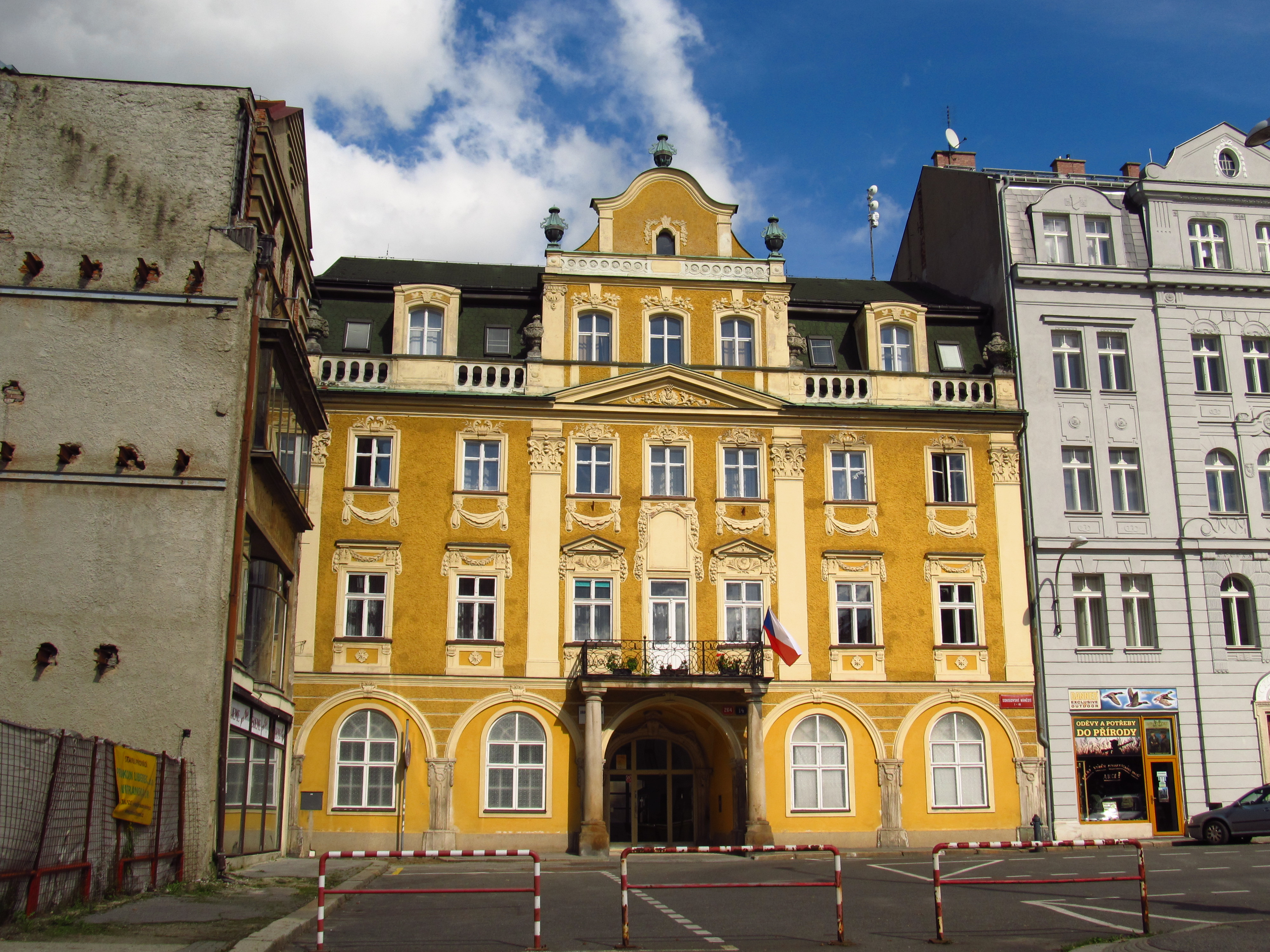 Appeltův dům, Sokolovské nám. 264/14, Liberec